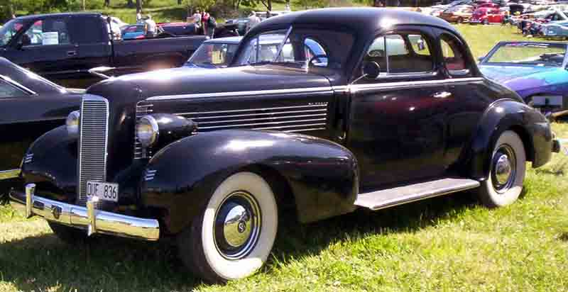 La Salle Series 38-5027 Coupé 1938